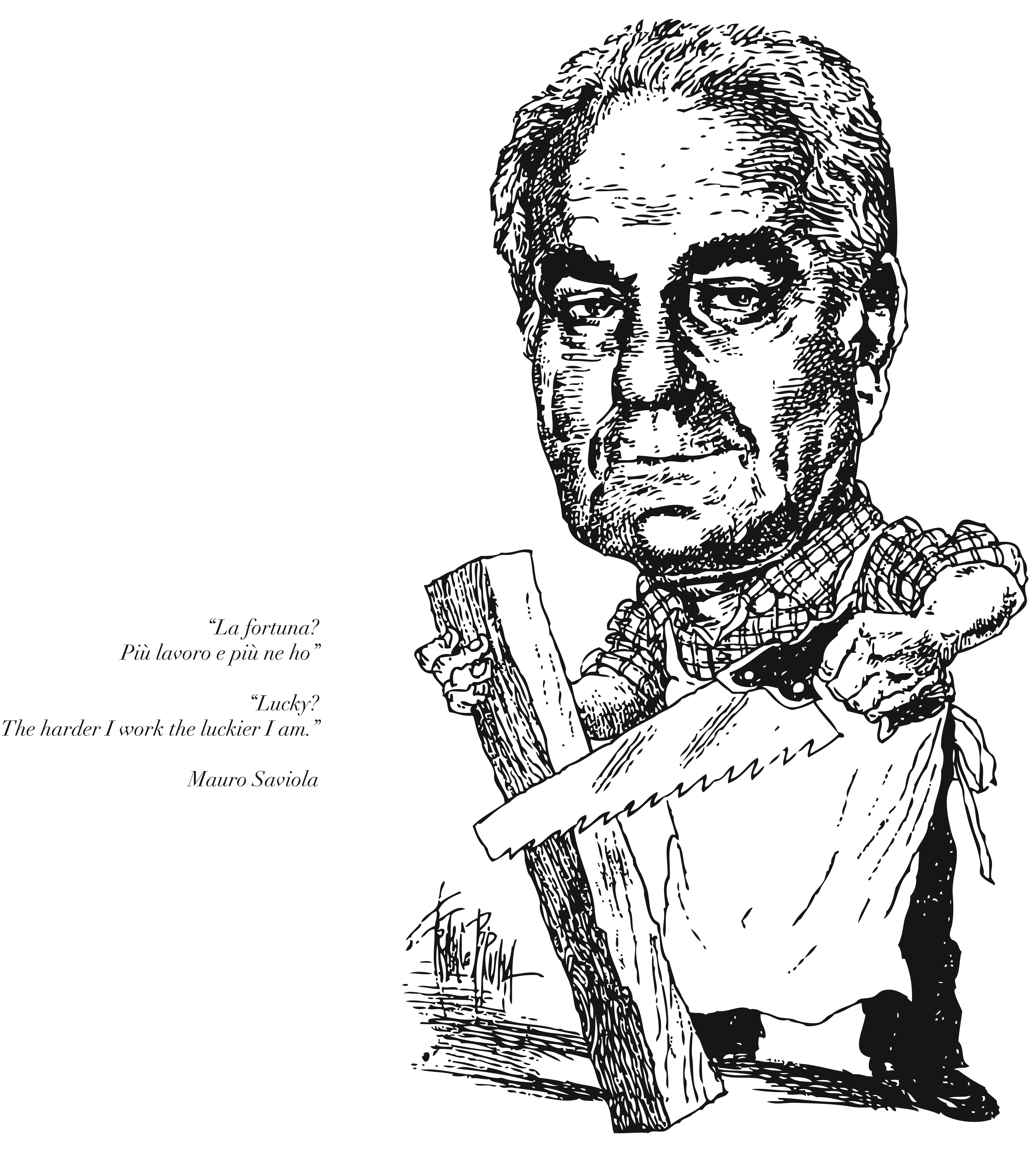 Vignetta raffigurante Mauro Saviola